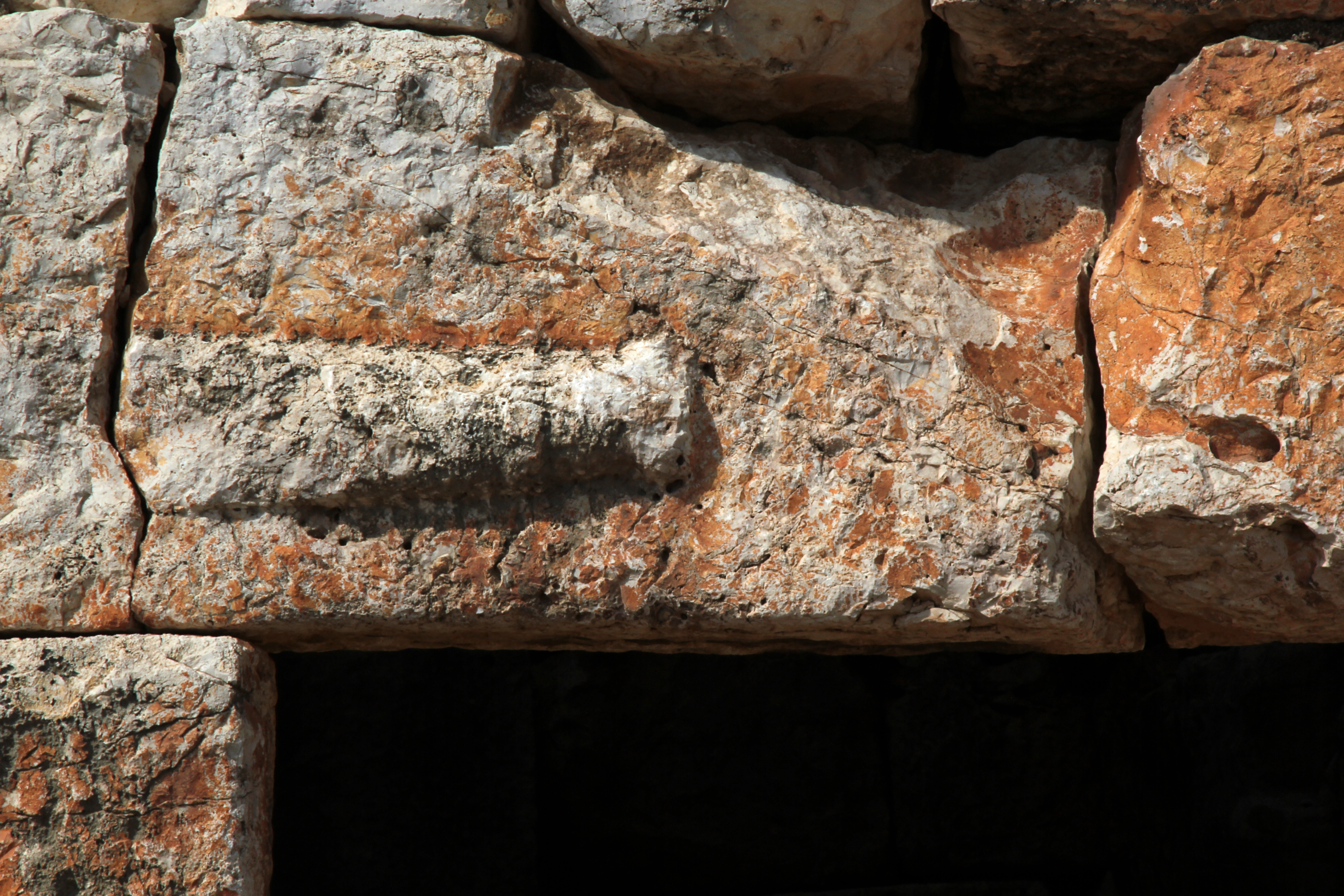 Kilikischer Turm von Sarayın bei Kızkalesi in der Südtürkei, Keule, Olbisches Zeichen über der Tür